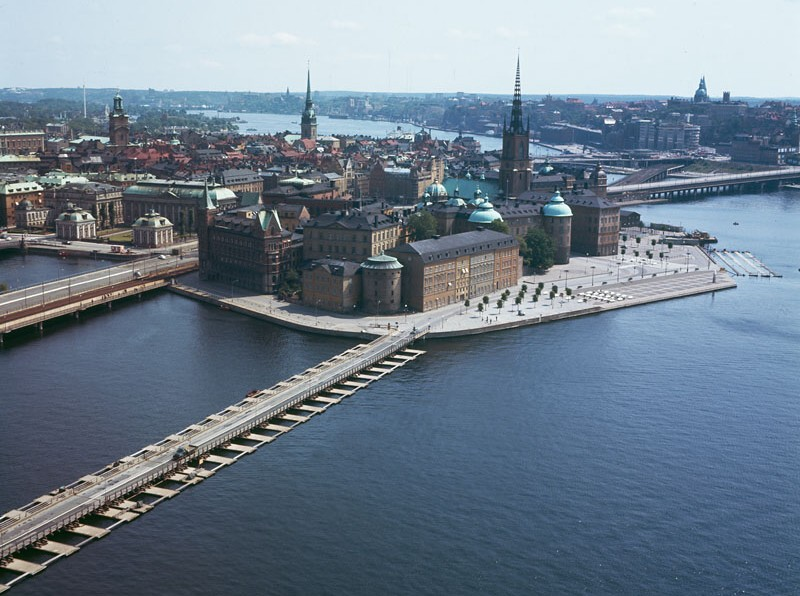 Utsikt från Stadshustornet mot Riddarholmen och Gamla Stan. I förgrunden den provisoriska pontonbron "Riddarbron" som revs i september 1967. (Bilden är beskuren)